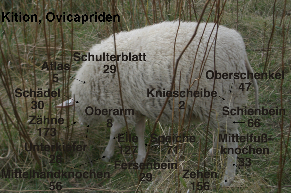 Anteile der Koerperteile im Tempel 1 von Kition, Daten nach Nobis